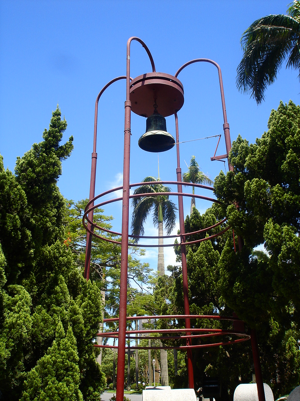 臺北市臺灣大學校園內的傅鐘。